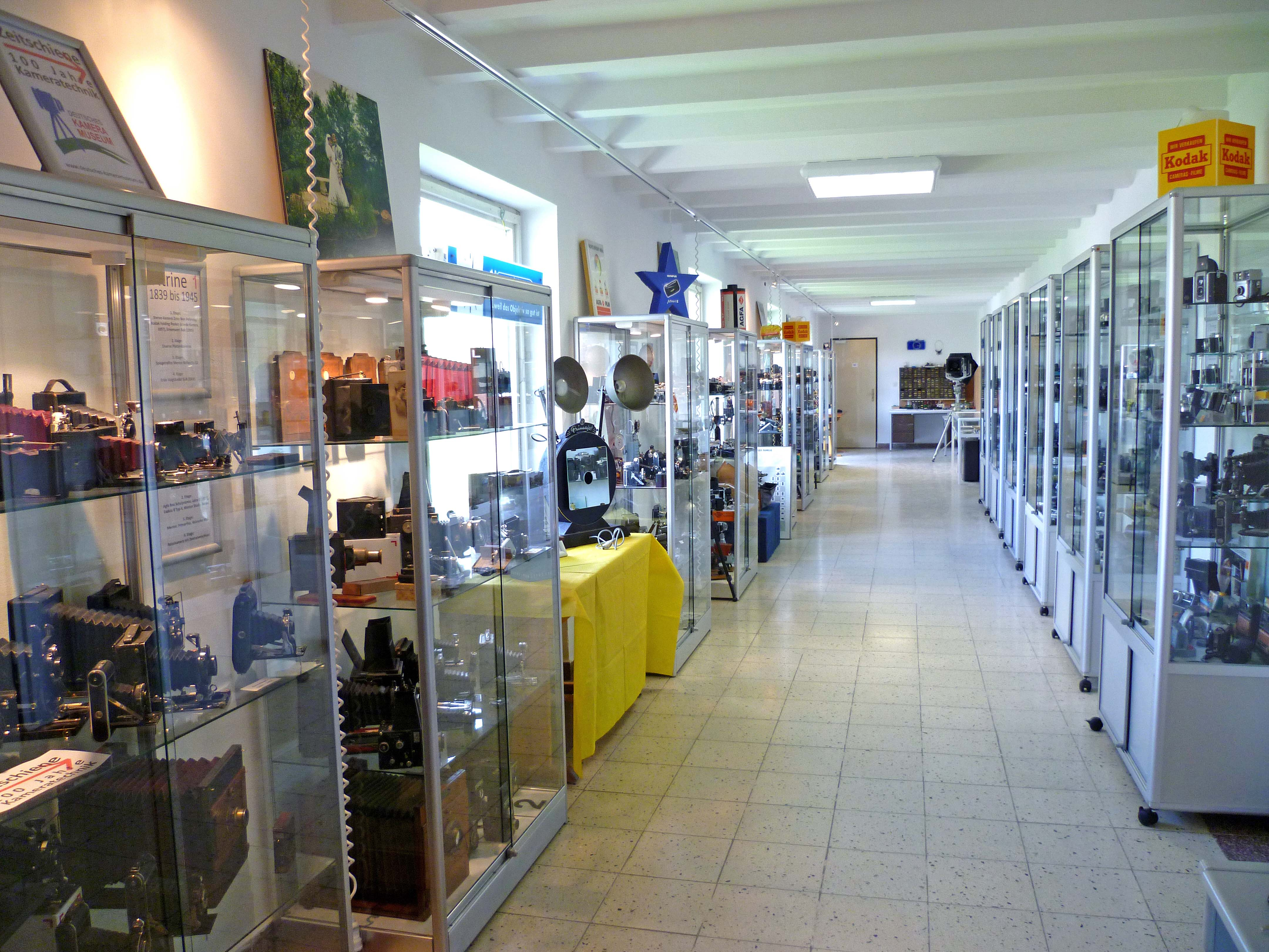 Dt_Kameramuseum_Plech_Blick_zu_den_Vitrinen_2013